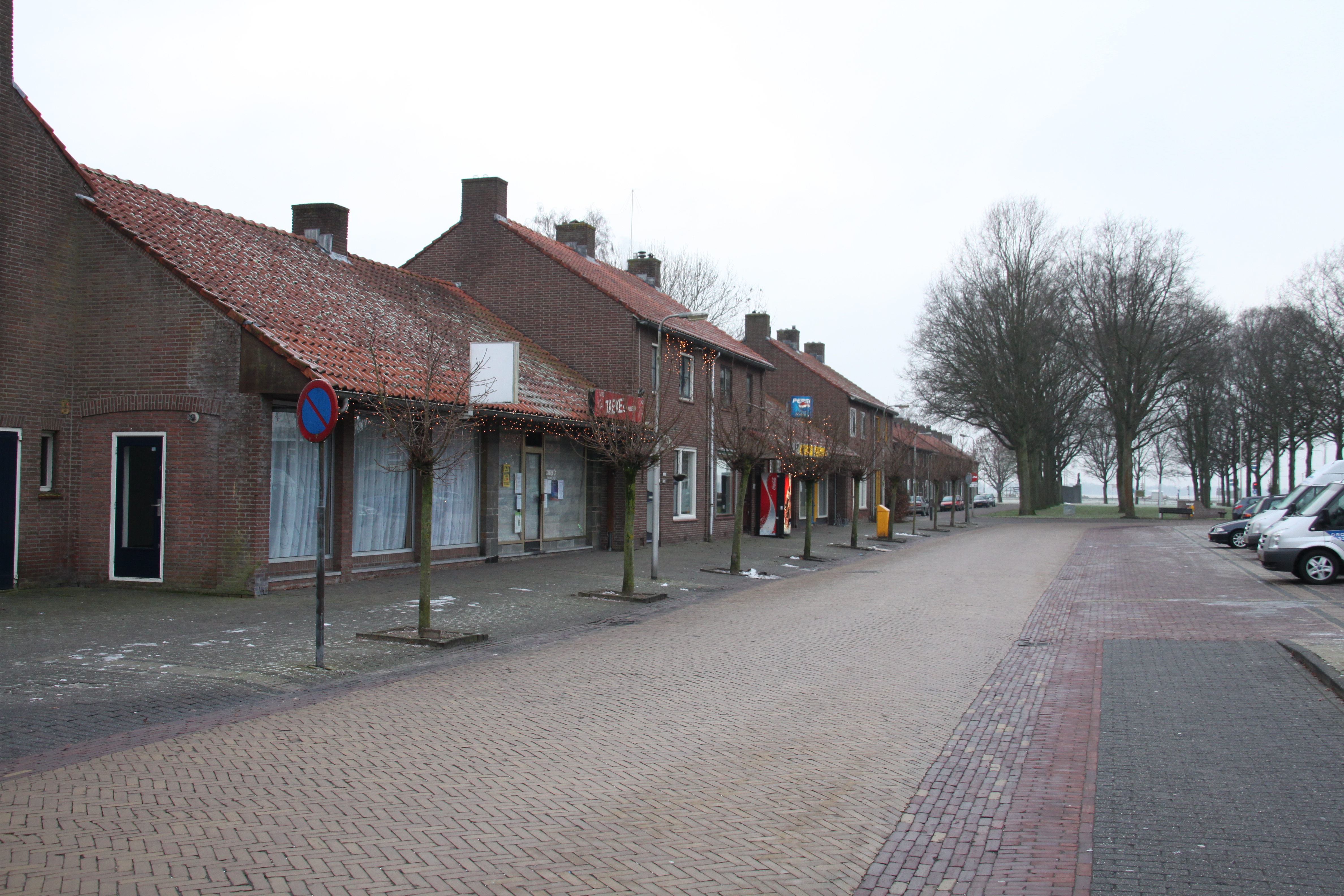 Ens, Noordoostpolder